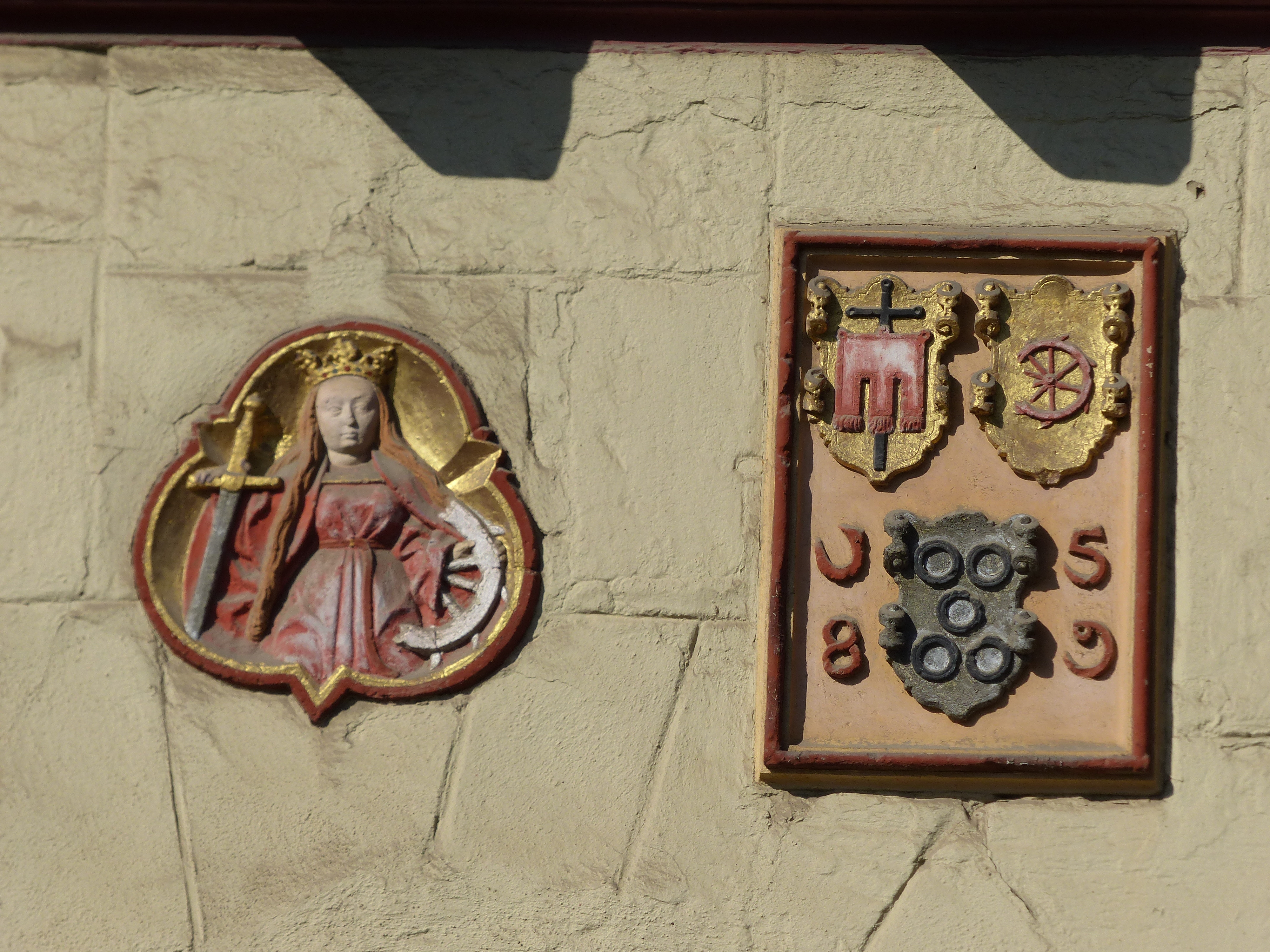 Möhringer Wappen am Torgebäude des Spitalhofes, Filderbahnstraße 27, Stadtteil: Möhringen-Mitte, Stadtbezirk: Möhringen, Stadt Stuttgart, Land: Deutschland